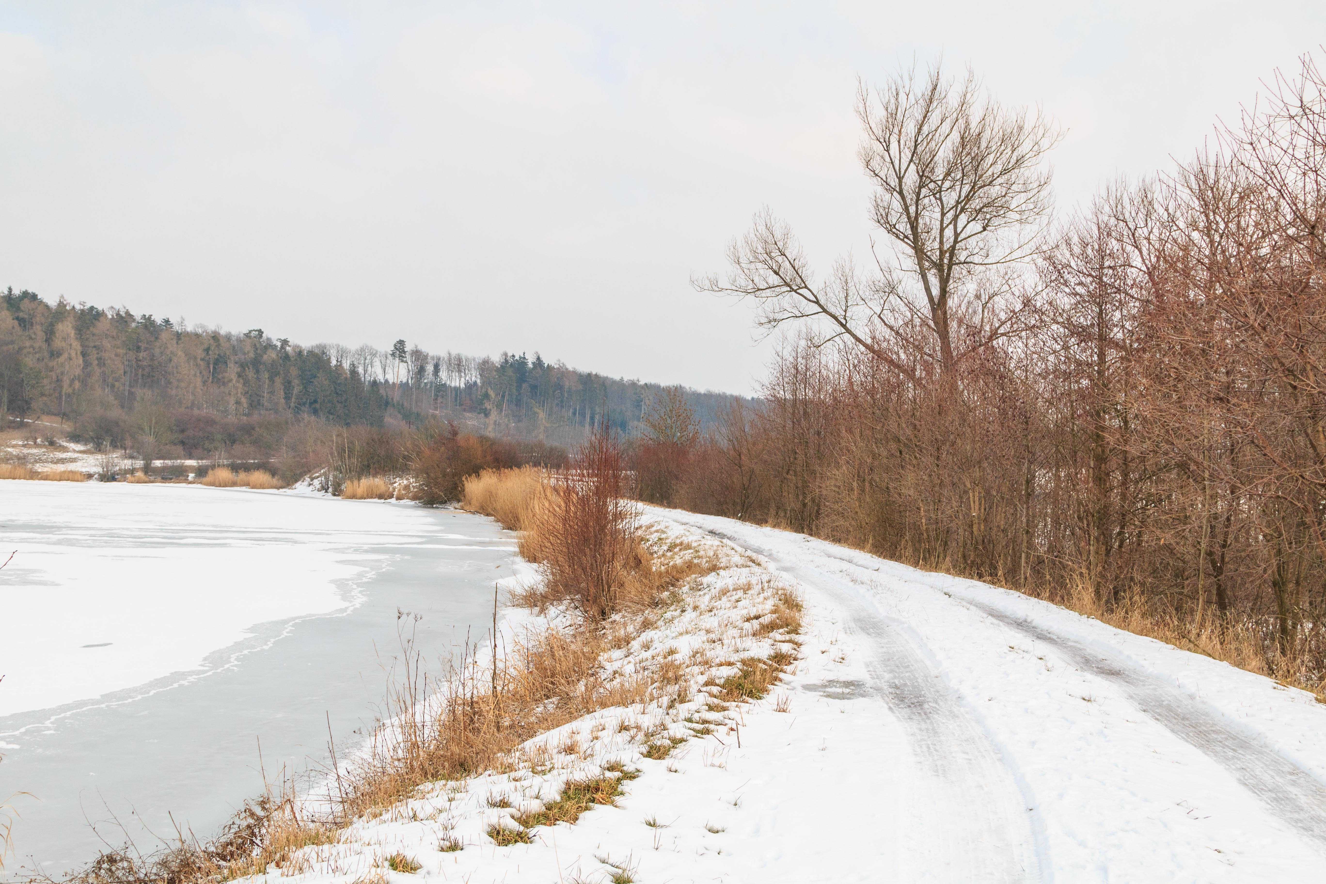 Střevačský rybník